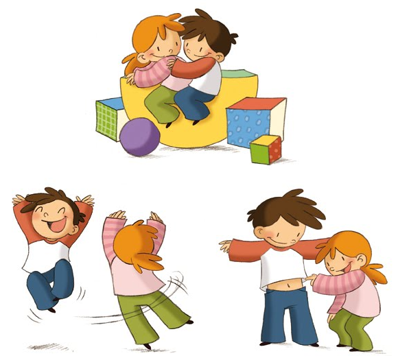 Psicomotricitat